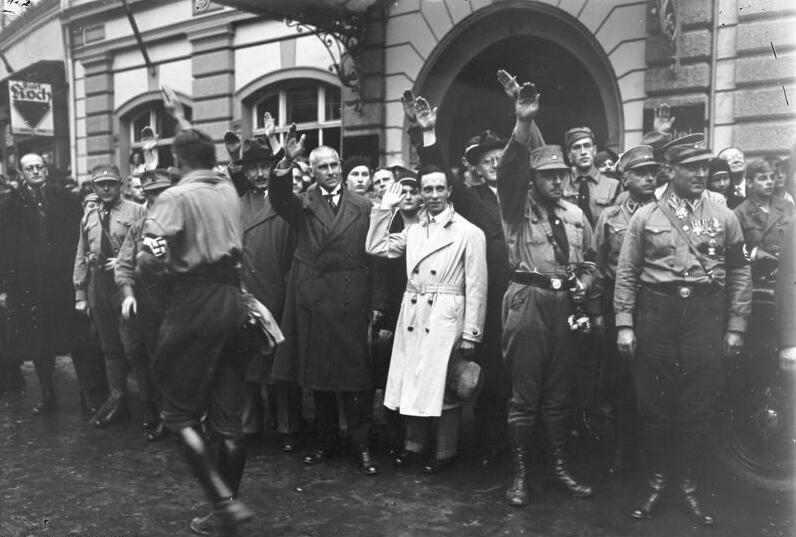 Der grosse Aufmarsch der Nationalsozialisten in Weimar vor dem Führer Adolf Hitler. Anwesend waren der thüringische Innenminister Nationalsozialist Dr. Frick, sowie der nationalsozialistische Reichstagsabgeordnete Dr. Goebbels (Berlin). Der thüringische Innenminister Nationalsozialist Dr. Frick (links) und der nationalsozialistische Reichstagsabgeordnete Dr. Goebbels (Berlin) rechts, grüssen die vorbeimarschierenden Hiltlerleute mit Faszistengruss.